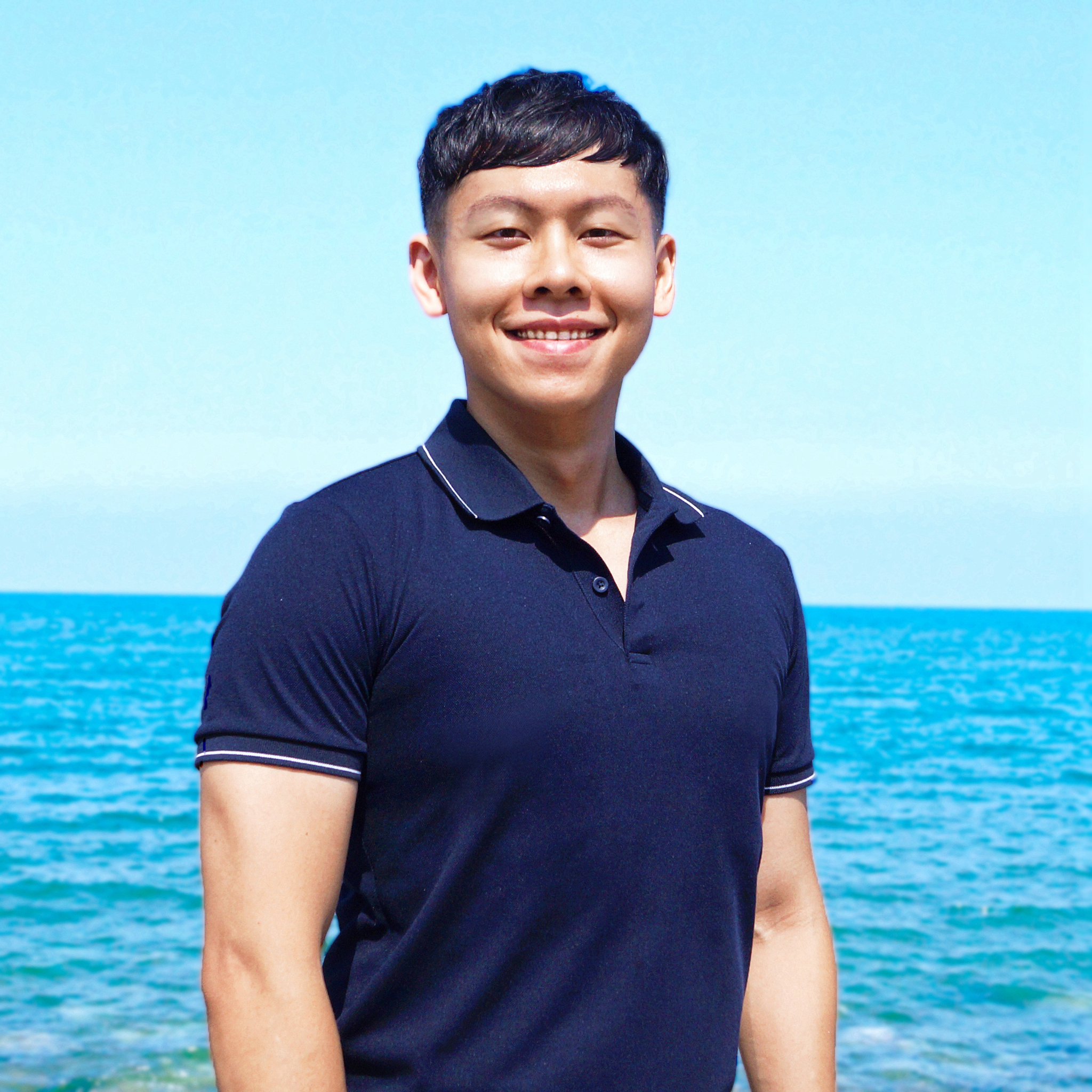 中文（台灣）: 姚念廣（1988年3月18日－），台灣作家；高中時開始於網路分享創作而成為部落客，並曾任部落格賽事之評審；於就讀大學時打籃球傷到眼睛導致視網膜剝離，於手術挽回視力後，深感人生無常而努力實踐兒時的出書夢想，後於2013年圓夢開始出書；2015年與群眾募資平臺合作發起公益環島以回饋社會。